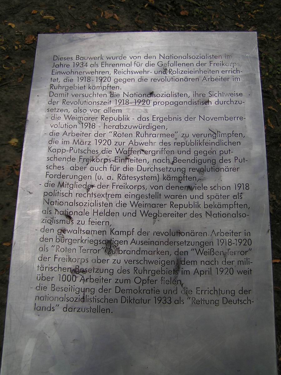 Das „Ruhrkämpferehrenmal” in Essen-Horst, für Gefallene der Freikorps, Einwohnerwehren, und der Reichswehr. Eingeweiht 1934 versuchten hier die Nazis im Dritten Reich die Ereignisse von 1918-1920, auch die Kämpfe im Ruhraufstand nach ihrer Sicht zu deuten.